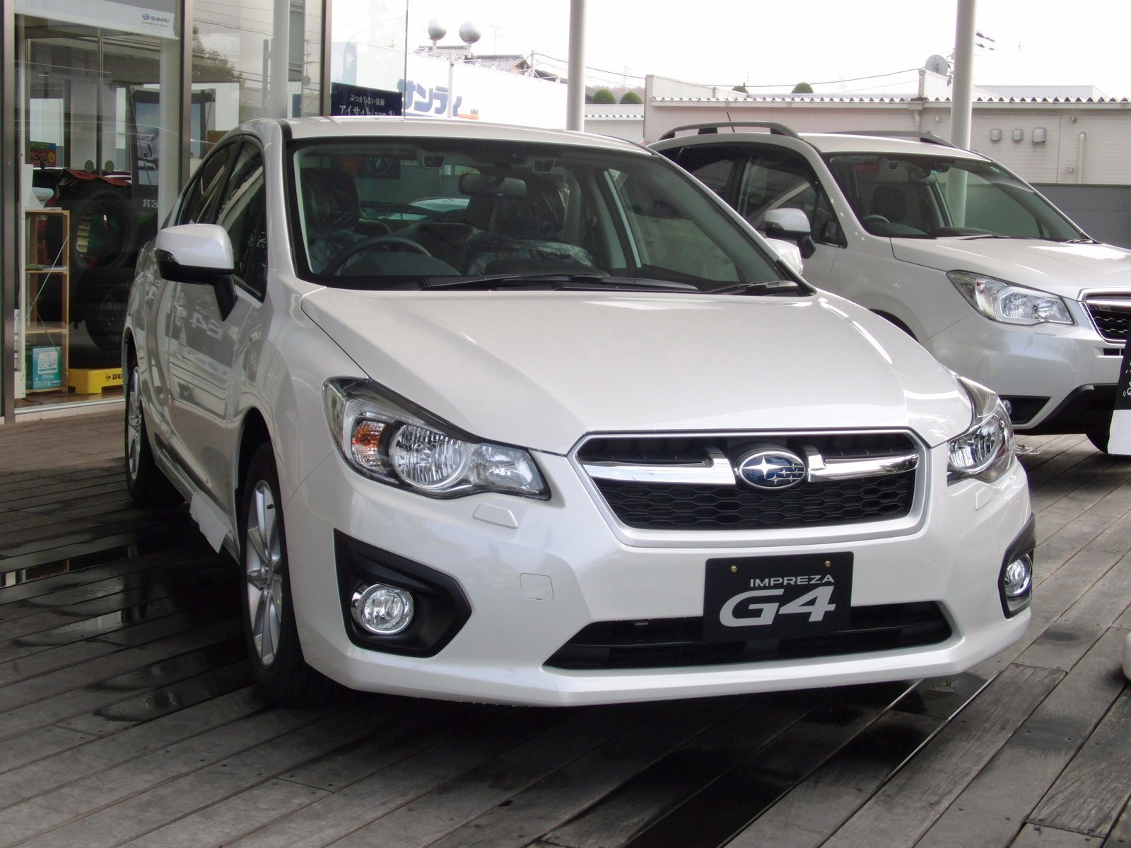 スバル・インプレッサG4をフロントから撮影